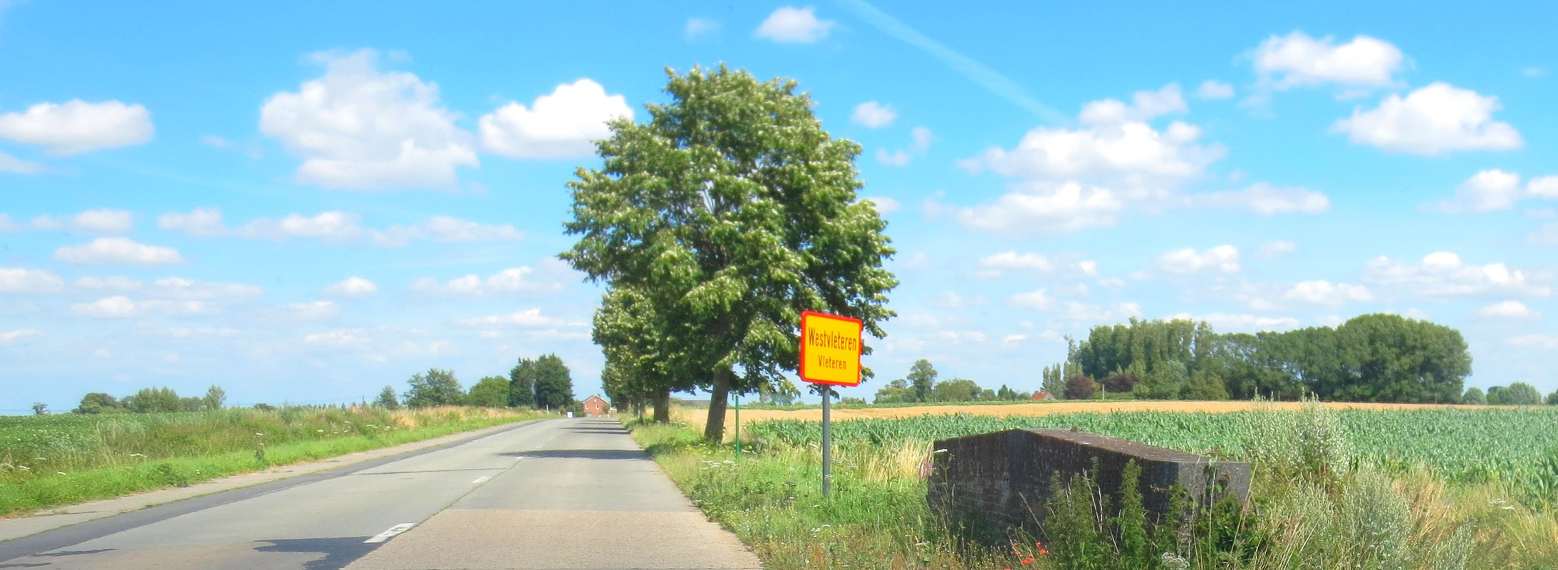 West-Vleteren